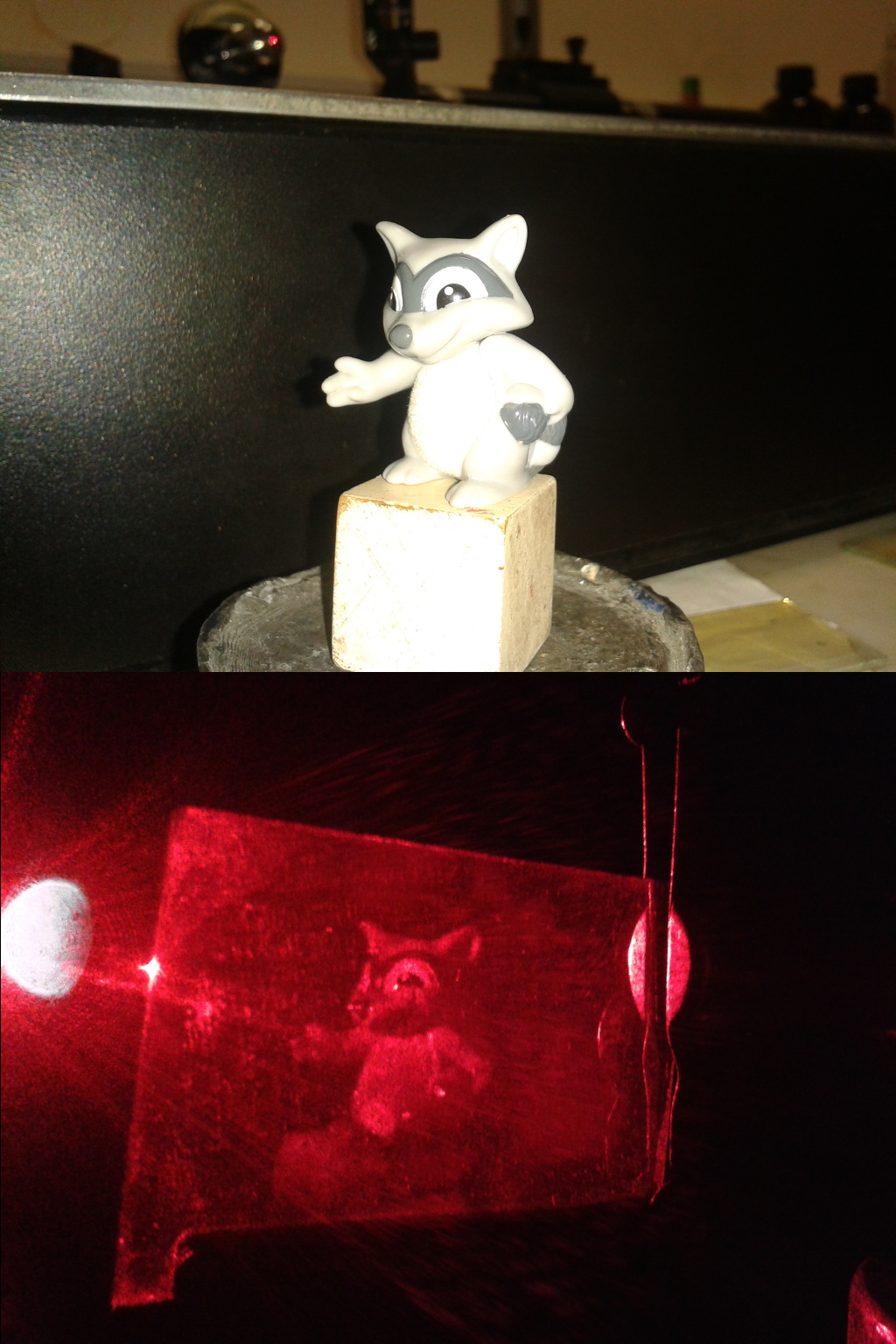 Slika objekta in rekonstruiranega holograma. Sliko sem posnel v sklopu Fizikalnega praktikuma 5 na Fakulteti za Matematiko in fiziko, Univerza v Ljubljani.